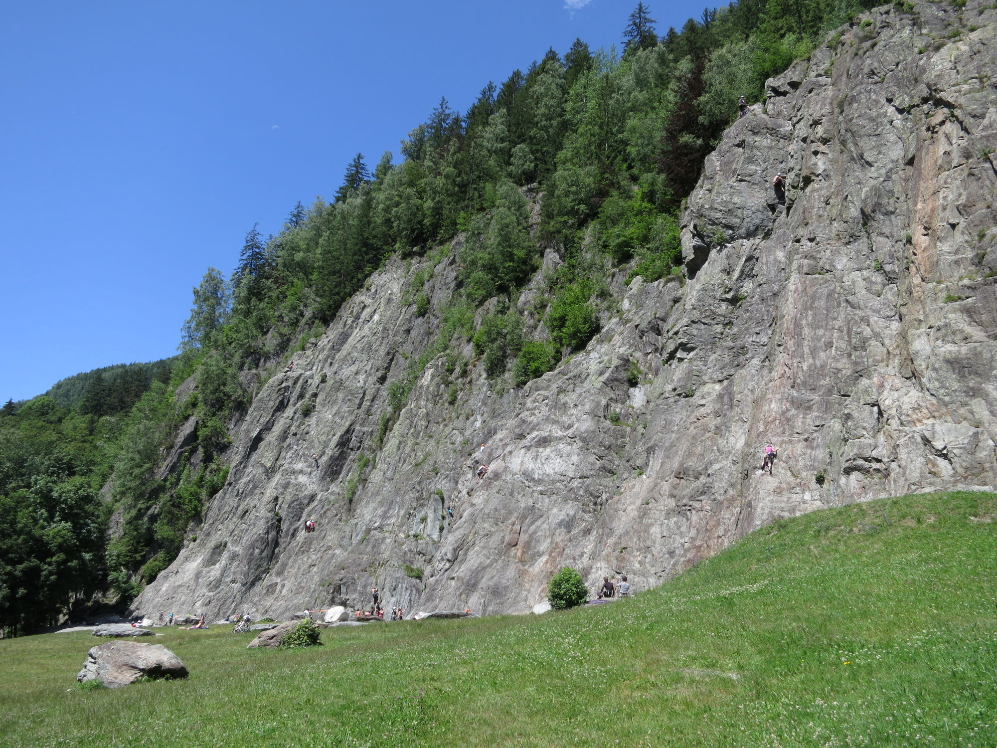 Site d'escalade des Gaillands (Chamonix, France)